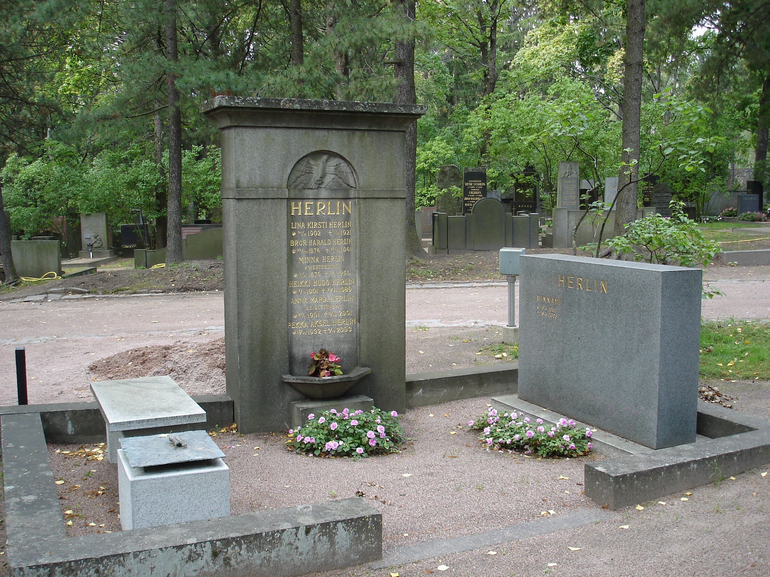 Herlinien sukuhauta Hietaniemen hautausmaalla